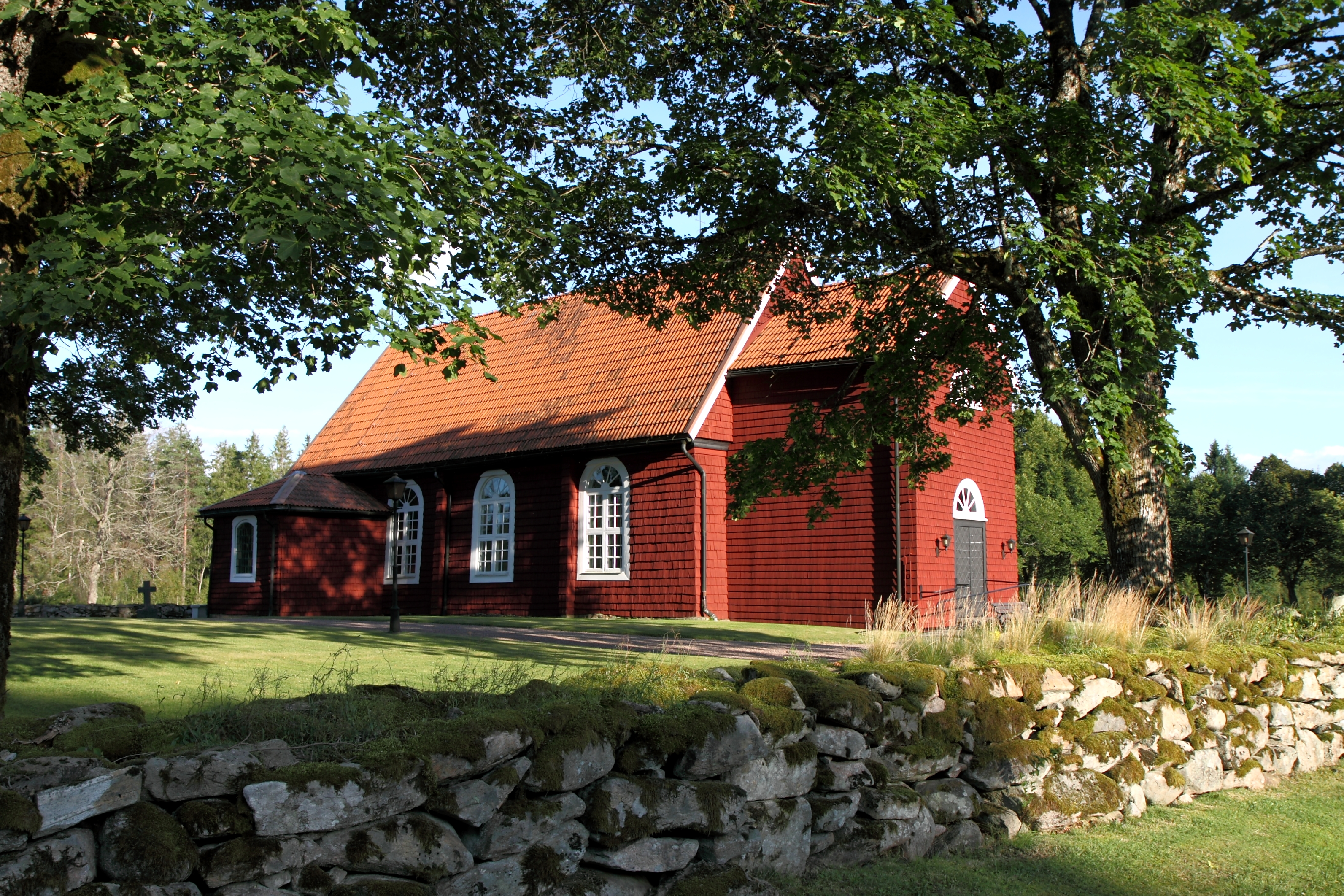 Ölsremma kyrka.